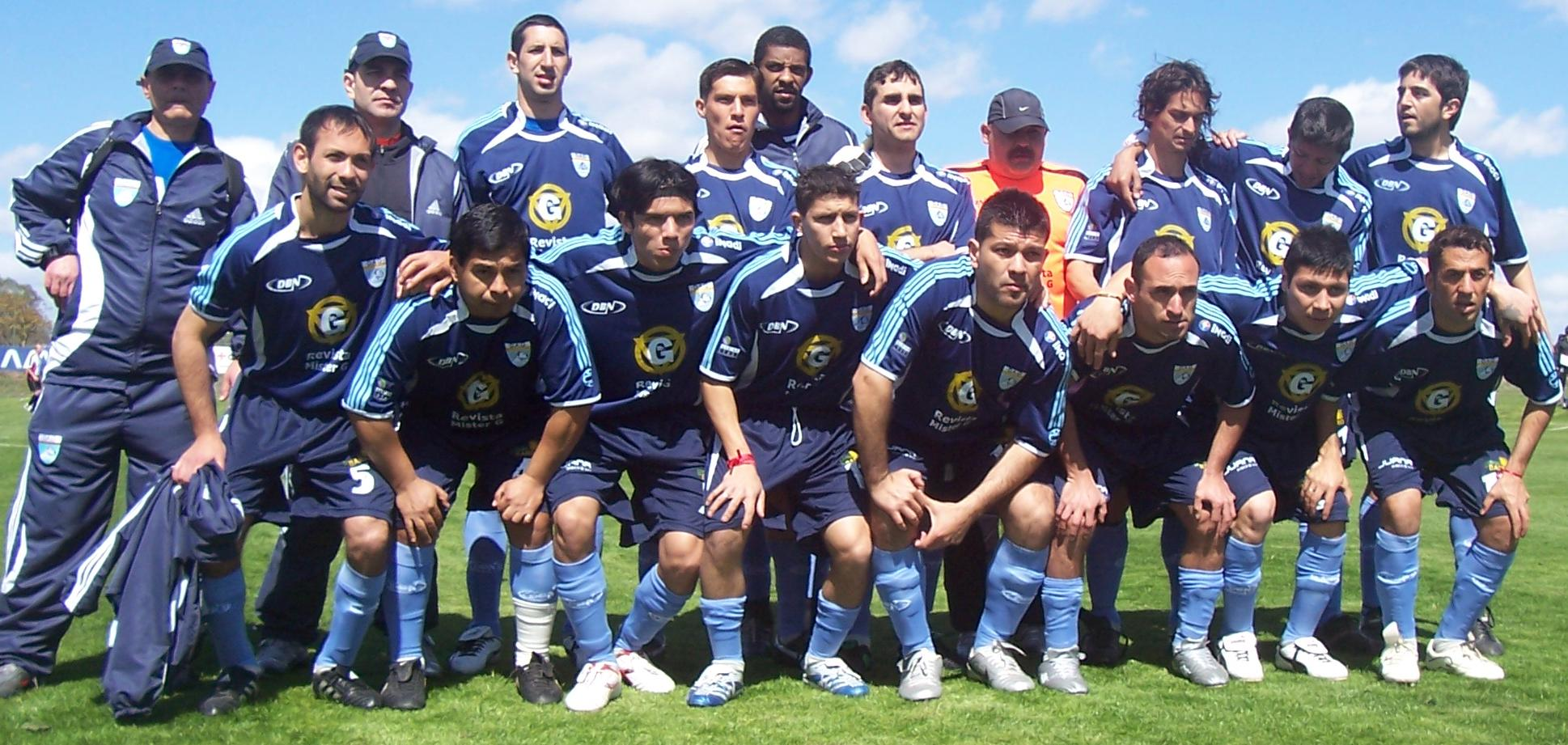 El equipo DOGOS, uno de los representantes de la Argentina en el 10º Mundial de Fútbol Gay realizado en Buenos Aires.